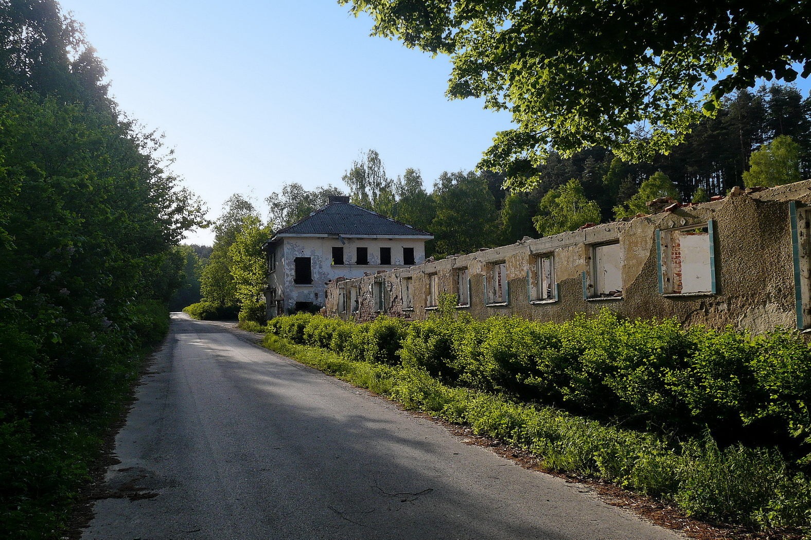 Jabloneček, silnice s cyklotrasou 241, vzadu bývalá česká škola